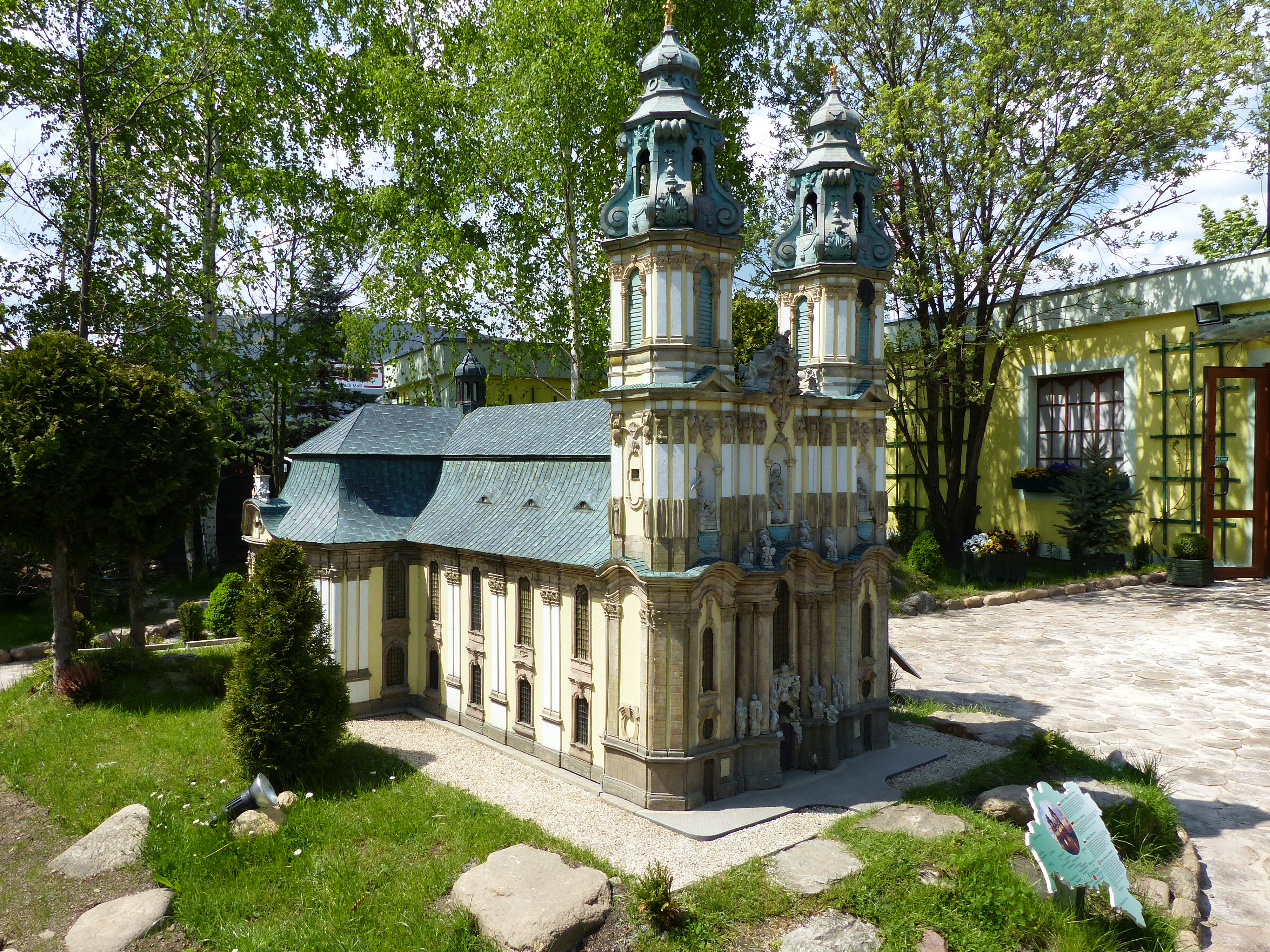 Miniaturen Park der Niederschlesischen Baudenkmäler in Kowary, Niederschlesien